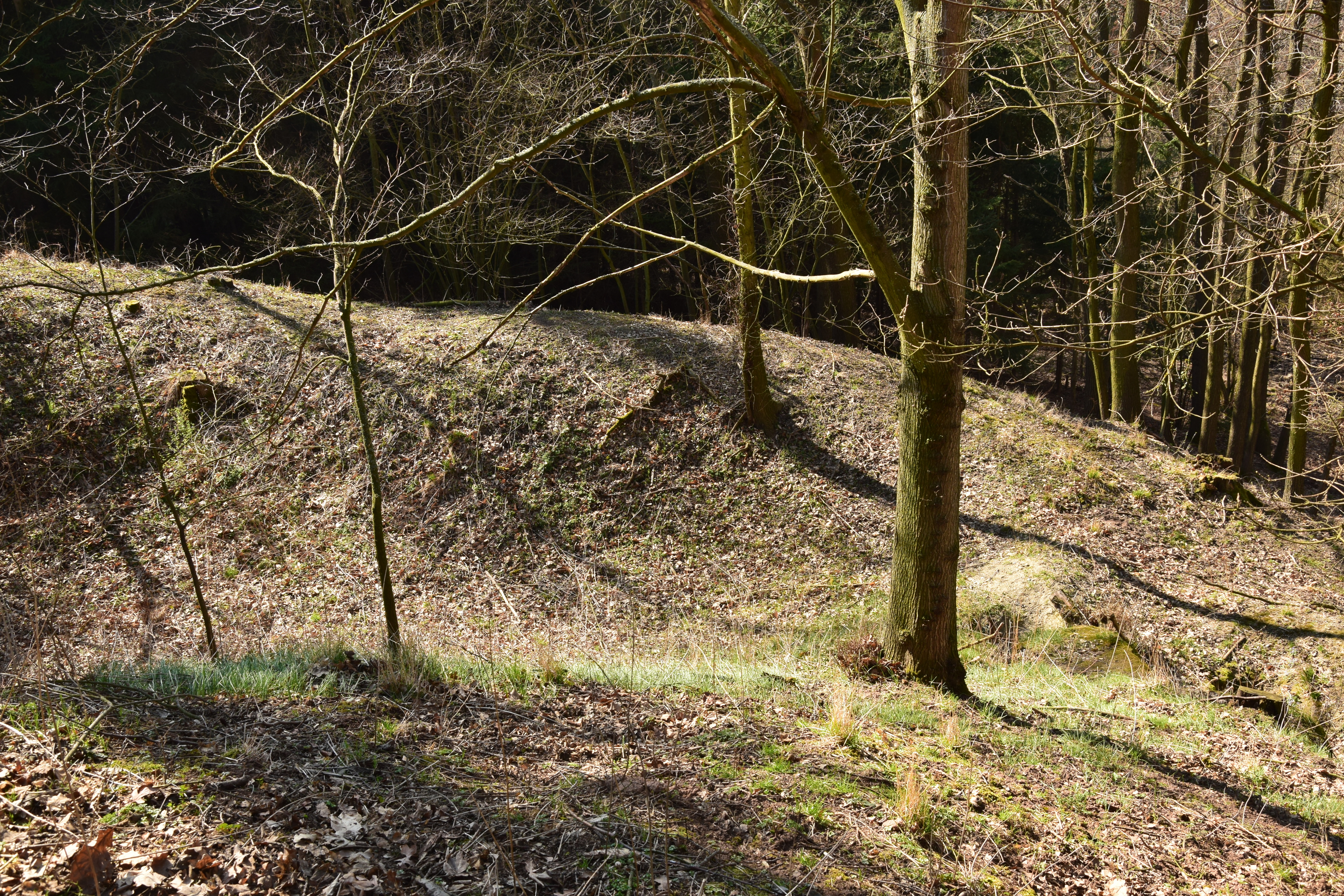 Dub – příkop a val